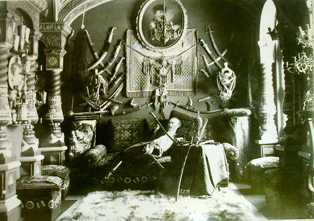 Фото. Кабинет-музей В. В. Тарновского. Хозяин с саблей Мазепы в руках.